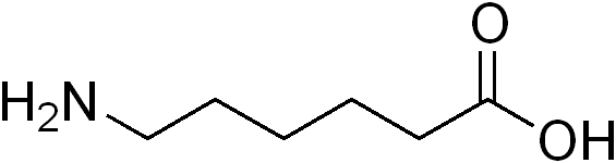 chemical structure of 6-aminocaproic acid